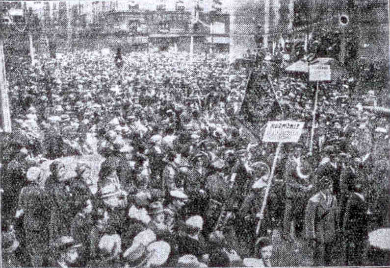 La foule parisienne assiste au défilé des harmonies, fanfares et orphéons participant au grand concours international de musique organisé par M. Oscar Dufrenne et le Petit Parisien.